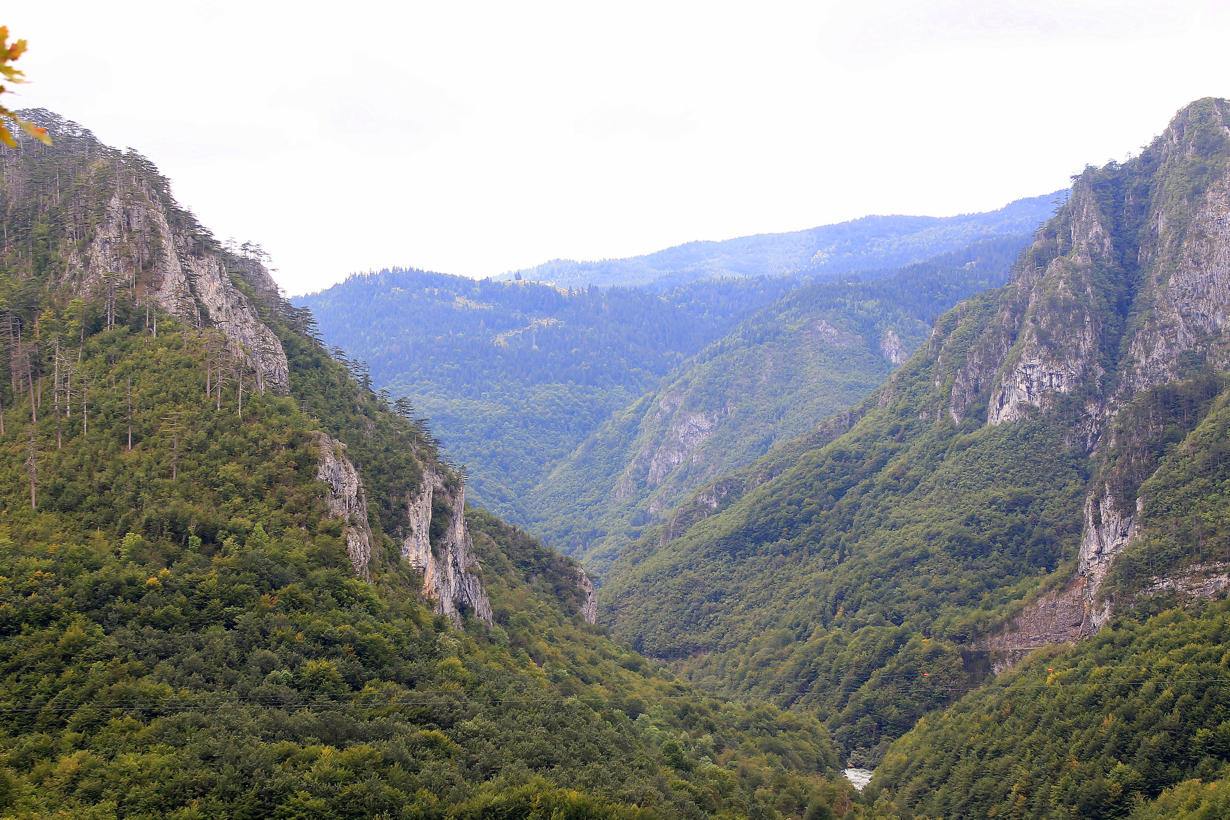 Река Тара. Черногория